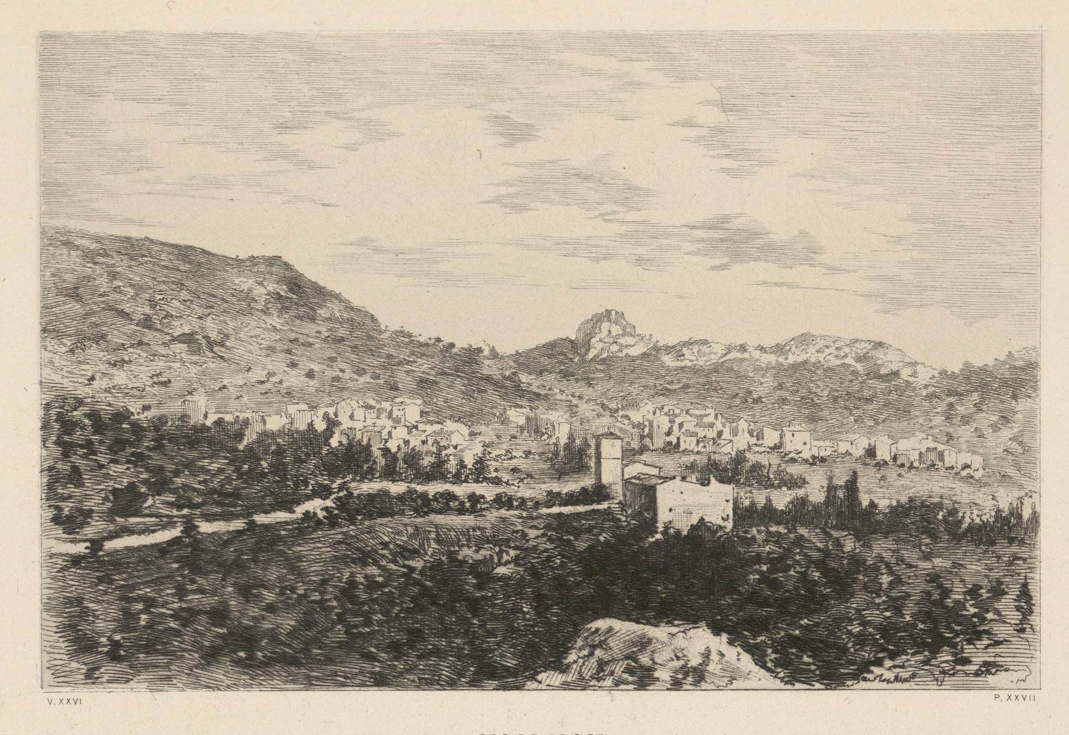 Vailhan. - Vue générale : estampe tirée de "Histoire des communes de l'Hérault" par Albert Fabre.